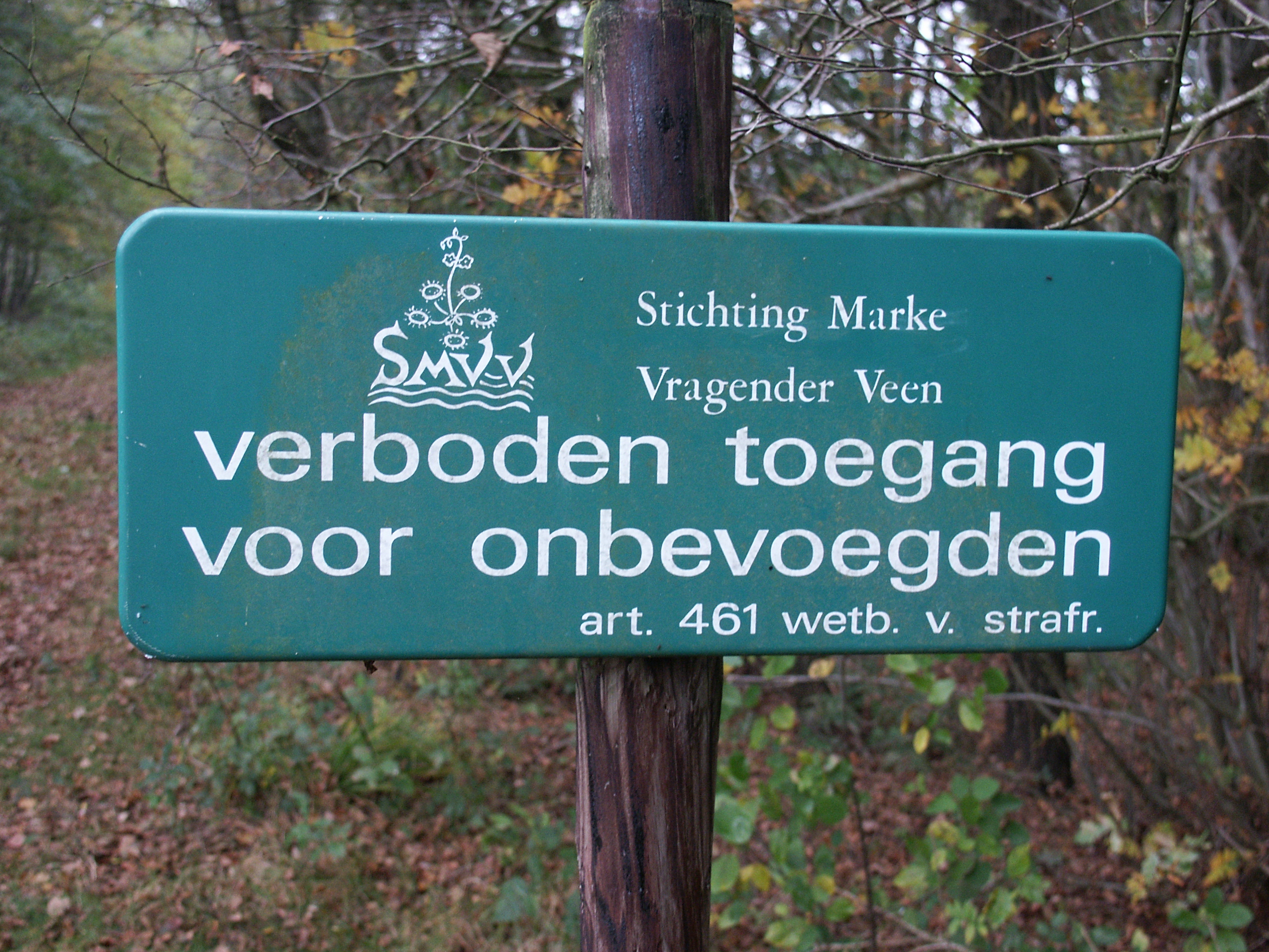 Bebording